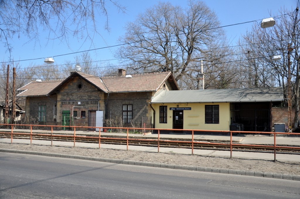 Új köztemető tram stop